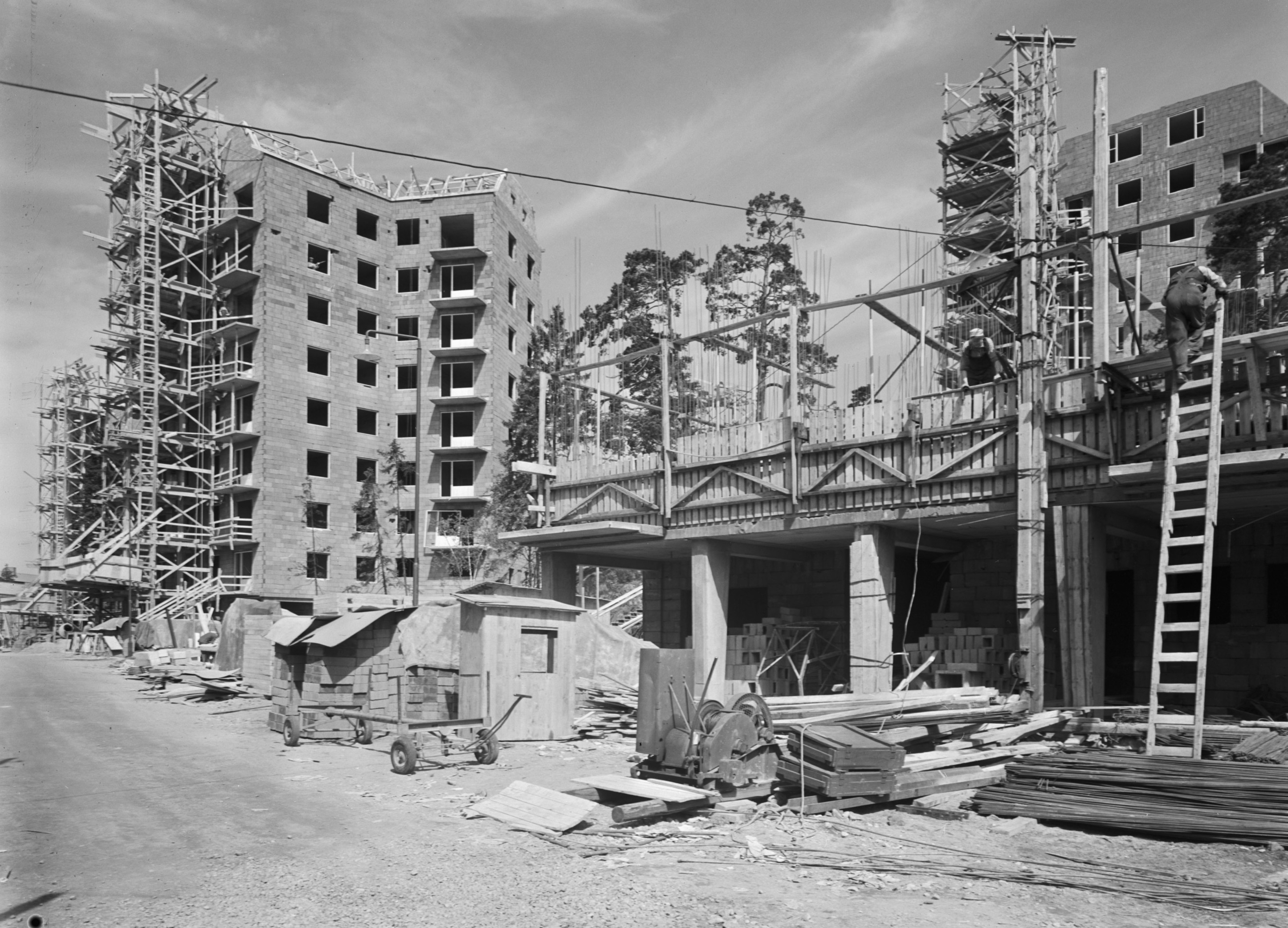 Stjärnhus i Västertorp uppförs med med glidform